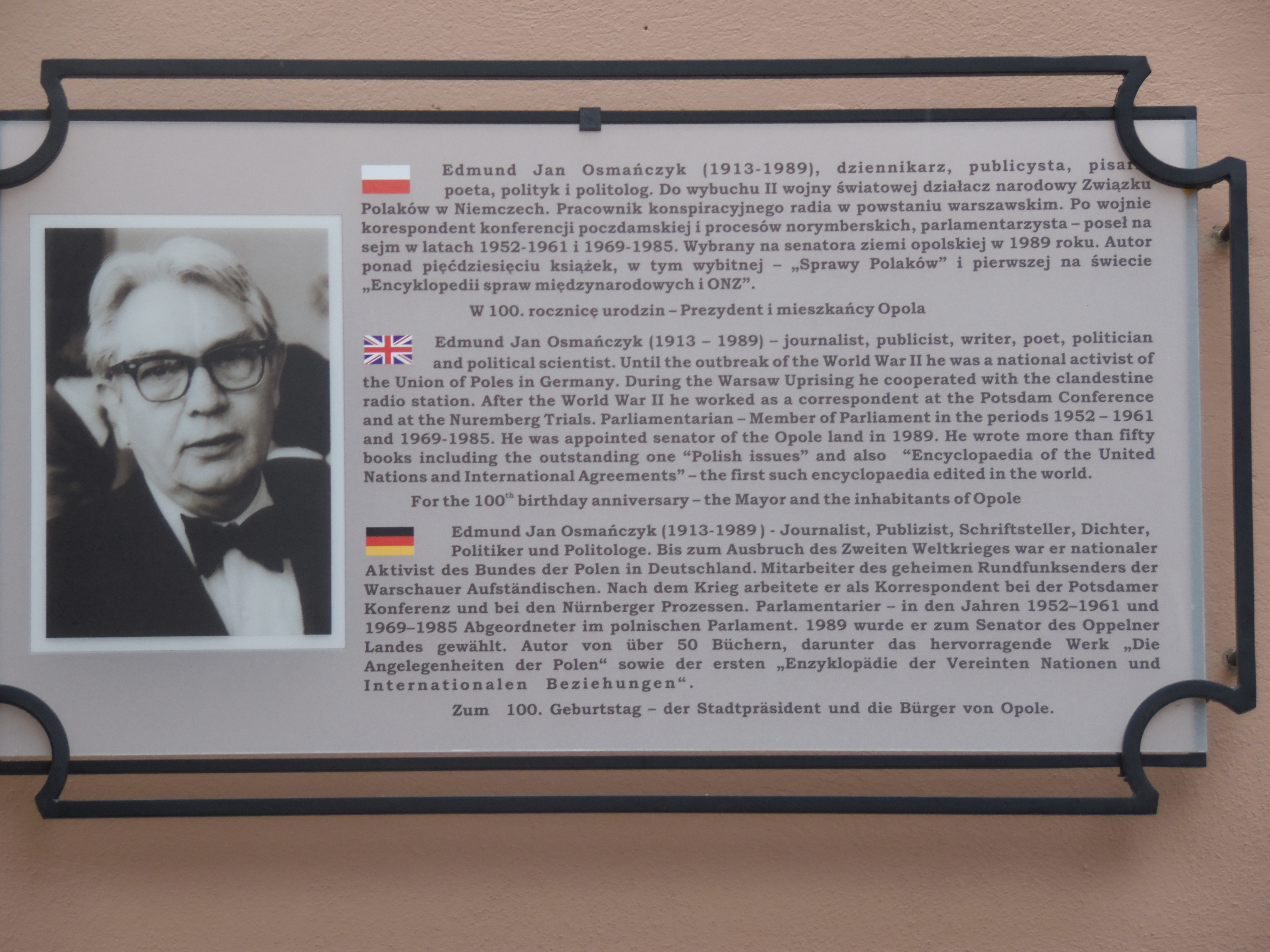 Tablica pamiątkowa poświęcona Edmundowi Osmańczykowi.